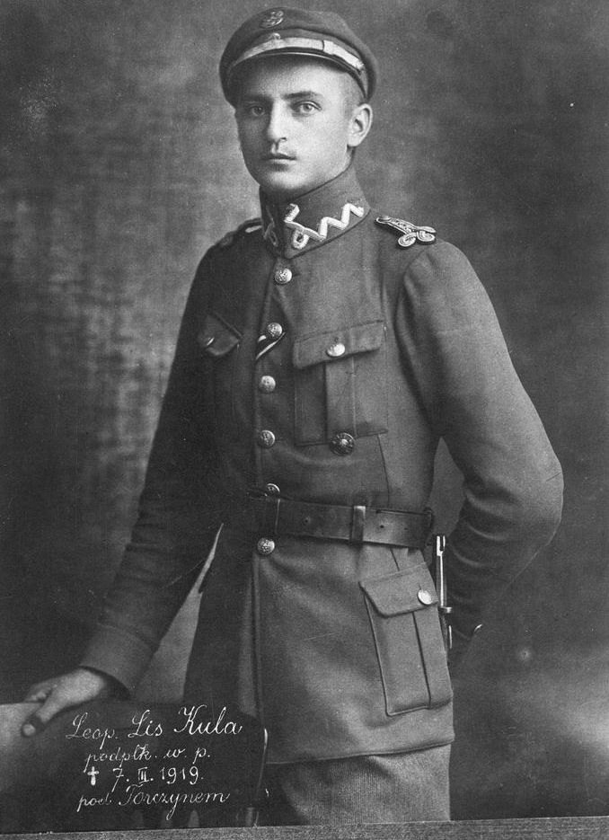 Leopold Lis-Kula (jako major)